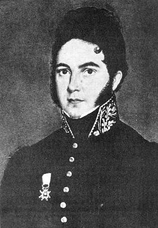 Manuel Diez de Bonilla (1800–1864), mexikanischer Botschafter und Gouverneur des Bundesstaates México